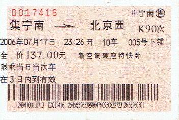 如圖所示。